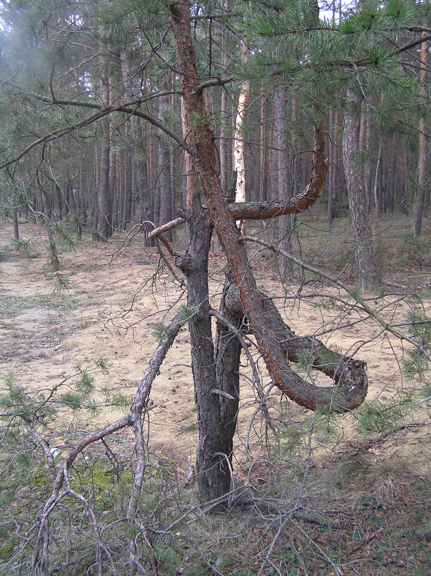 Krzywe drzewo